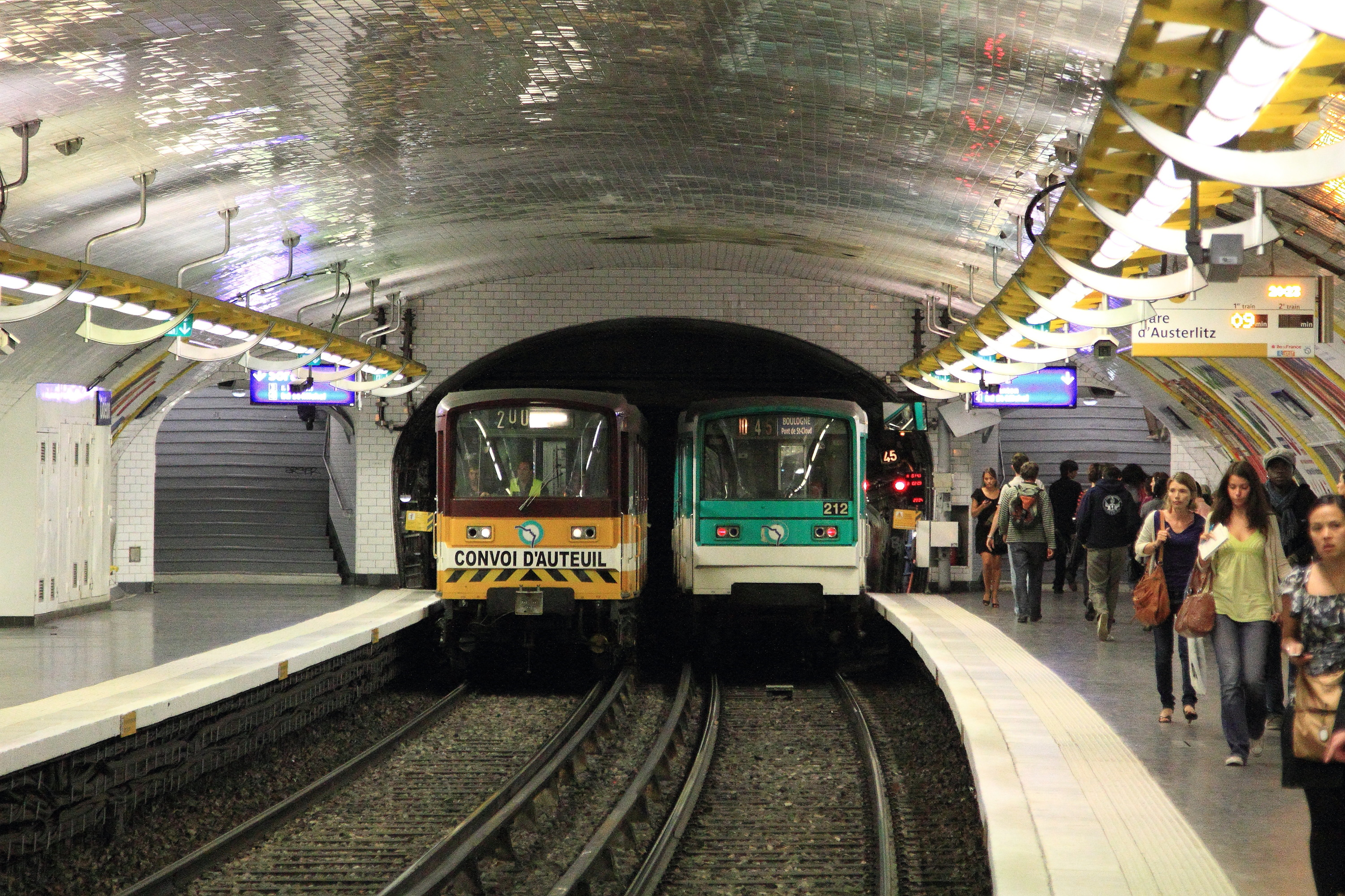 À la station du métro parisien Odéon, ligne 10, un métro du service normal de type MF 67 quitte la station alors qu'un train spécial de transport de marchandises (appelé Convoi d'Auteuil) pour l'atelier de maintenance d'Auteuil, passe en station.